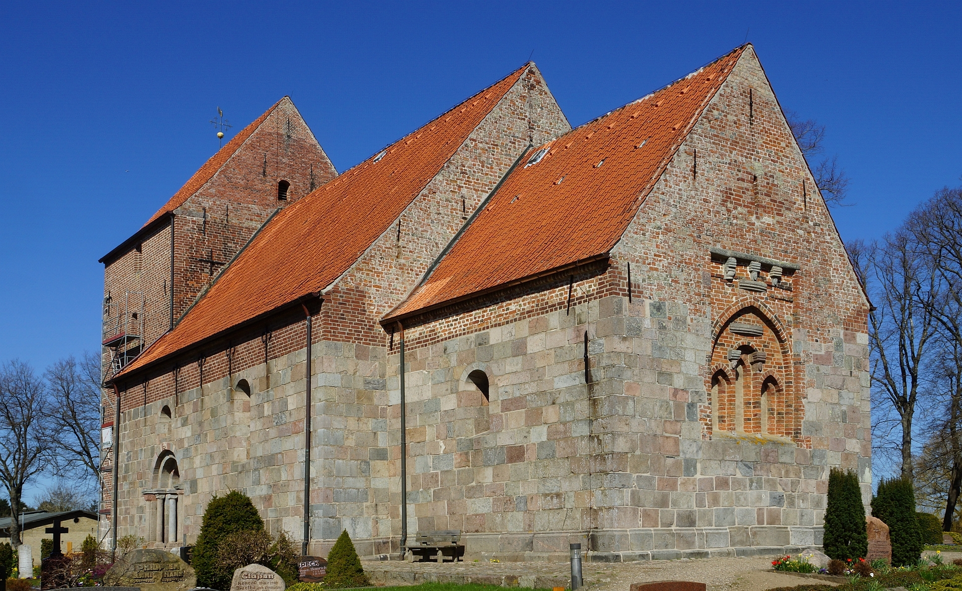 Munkbrarup Laurentiuskirche: Kirche aus dem 12. Jahrhundert, errichtet aus Natursteinquadermauerwerk nach Vorbild Söruper Kirche - Foto 2013 Wolfgang Pehlemann DSC01820